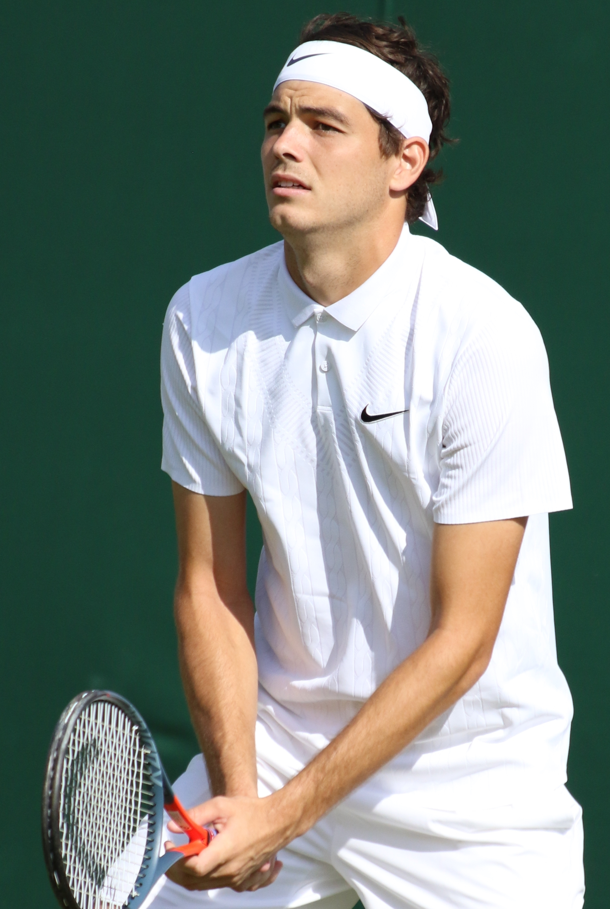 Fritz WM19 (3)